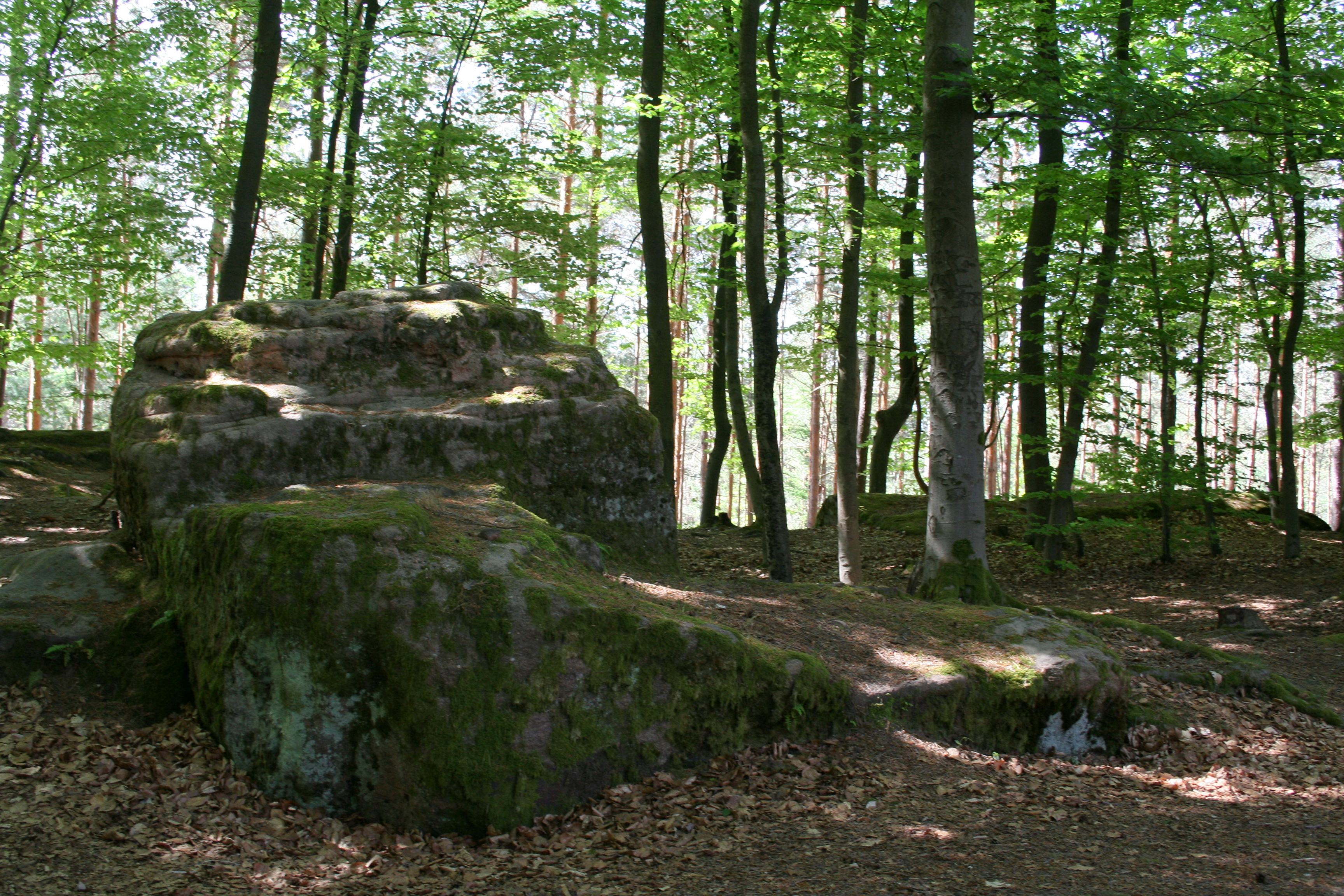 Burgstall Wartstein